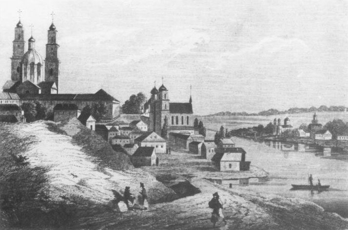 Беларуская (тарашкевіца): Полацак (Połacak), вуліца Вялікая (vulica Vialikaja)